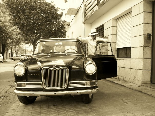 Es una foto en color sepia de un Siam Di Tella 1500 de la década de los sesenta. El que esta en la foto es Ehsan Rommel, un amigo.